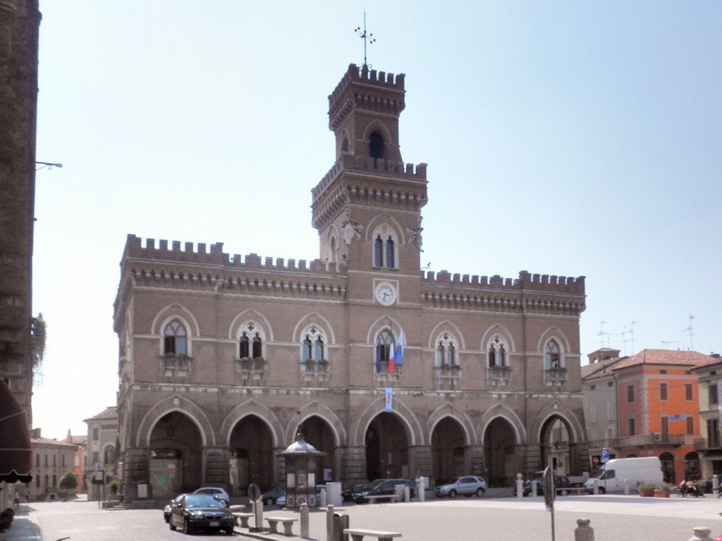 Palazzo municipale di Casalmaggiore.